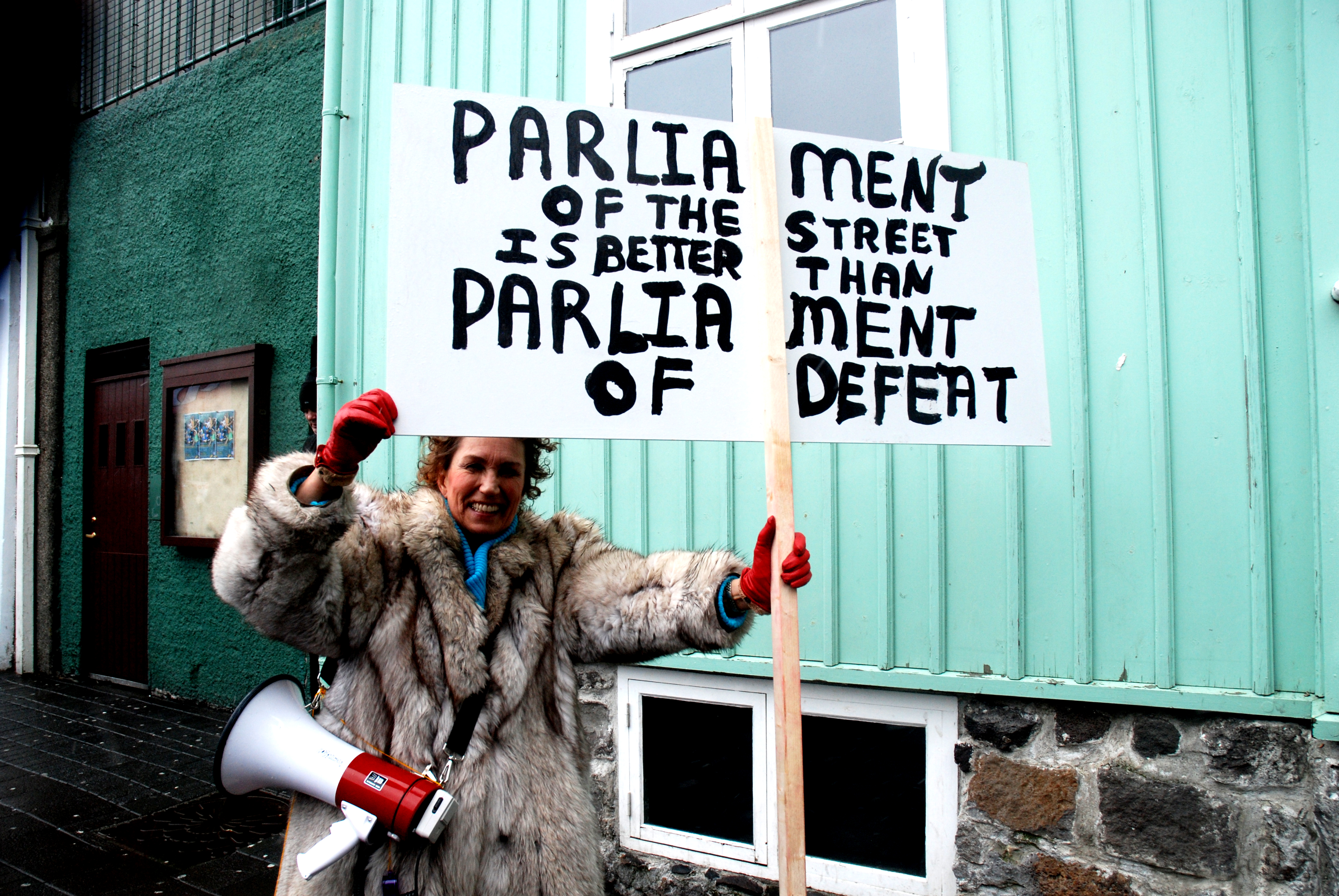 Fra demonstration omkring folkeafstemningen om en Icesave-lov den 6. marts 2010